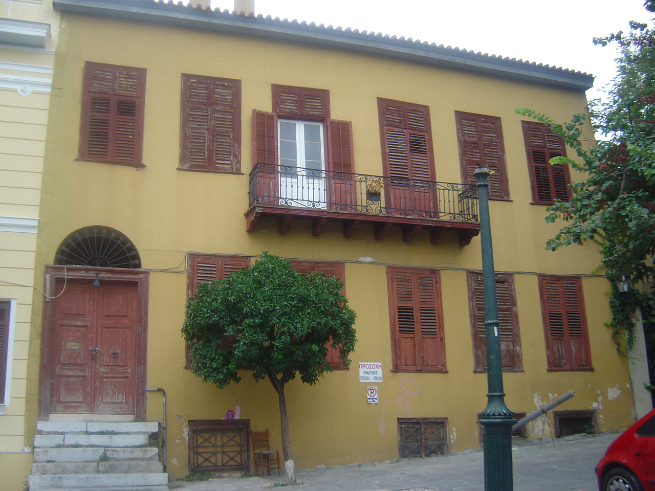 Το Αρχοντικό Χατζηκυριάκου στην Πλάκα